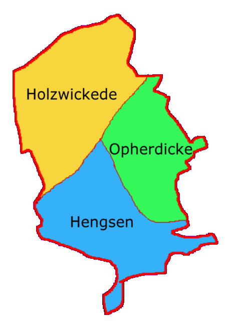 Ortsteile von Holzwickede. Autor: Andreas Heidemann, Juni 2005